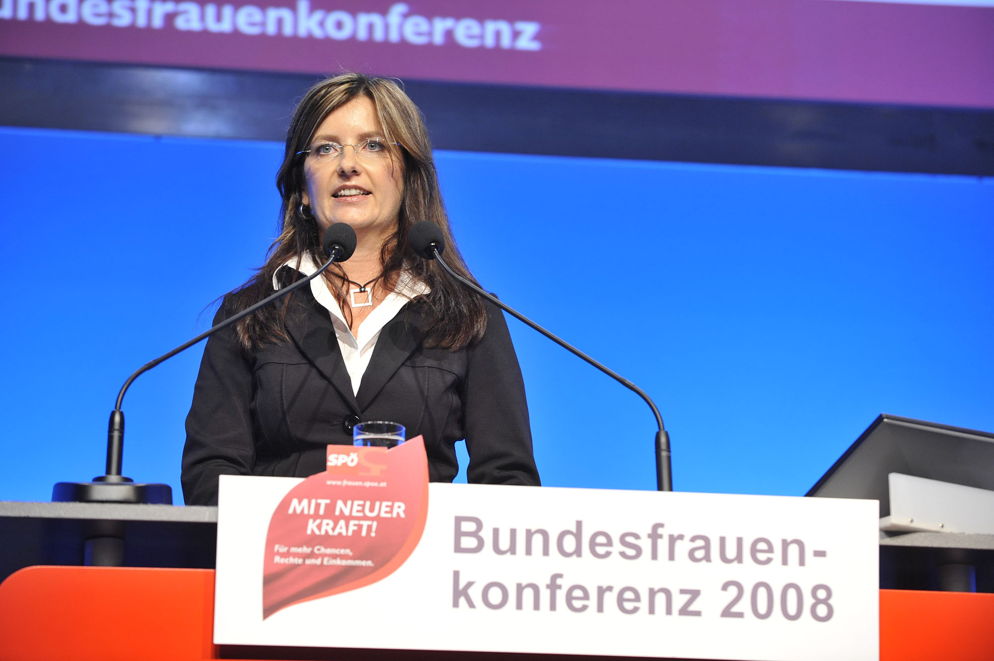 Bundesfrauengeschäftsführerin Bettina Stadlbauer auf der Bundesfrauenkonferenz 2008 im Linzer Design-Center.